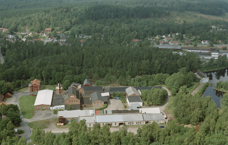 Bilden är tagen mot (väderstreck): NV Motiv: Rydöbruk Nyckelord: Flygbilder, Riksintressen Kategori: BruksmiljöBilden är tagen mot (väderstreck): NV.